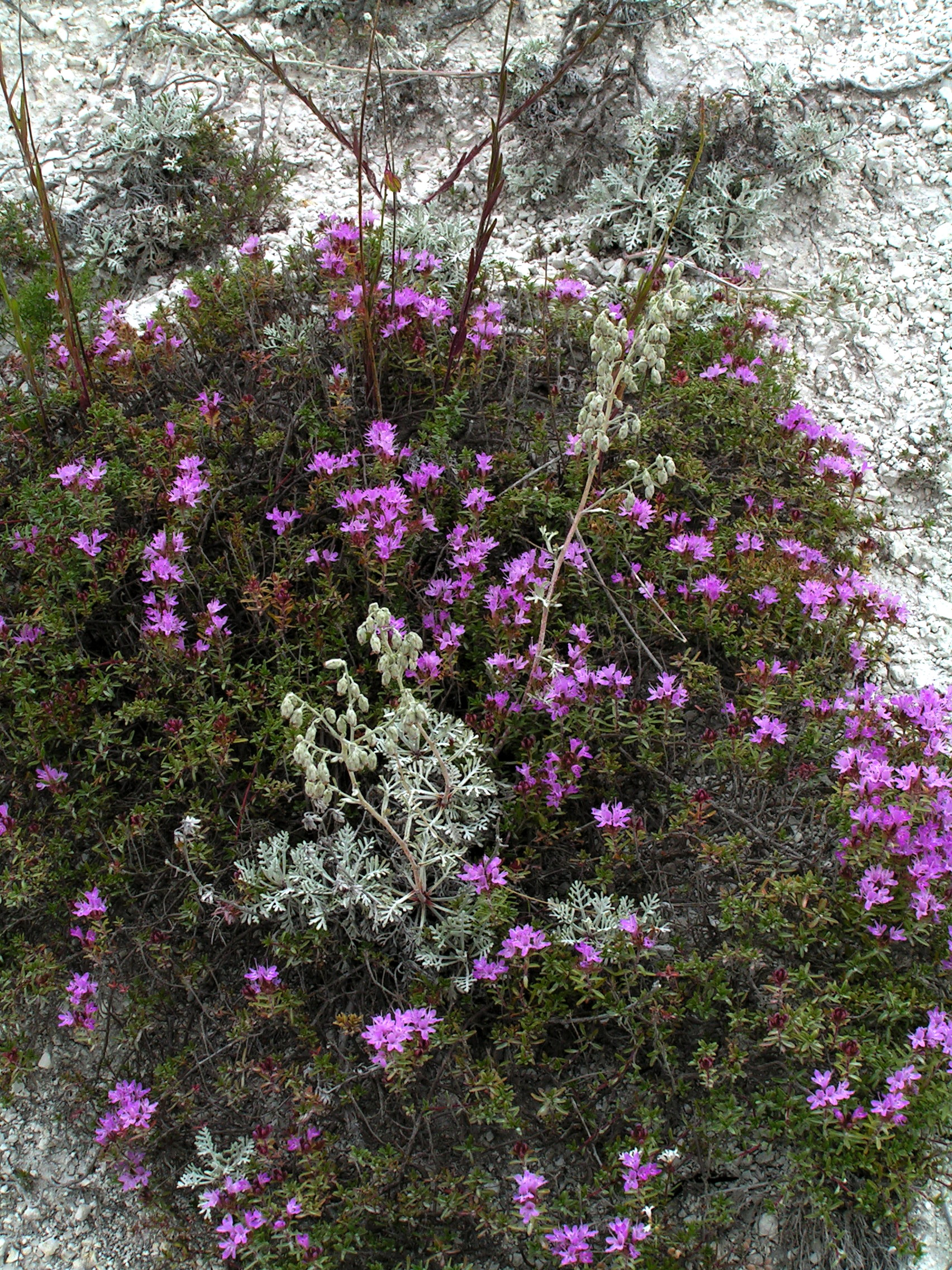 Крейдяні відслонення, Міловський район, неподалік від с. Стрільцівка